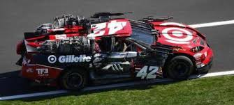 this is a Chevrolet Impala #42 of Chip Ganassi Racing red